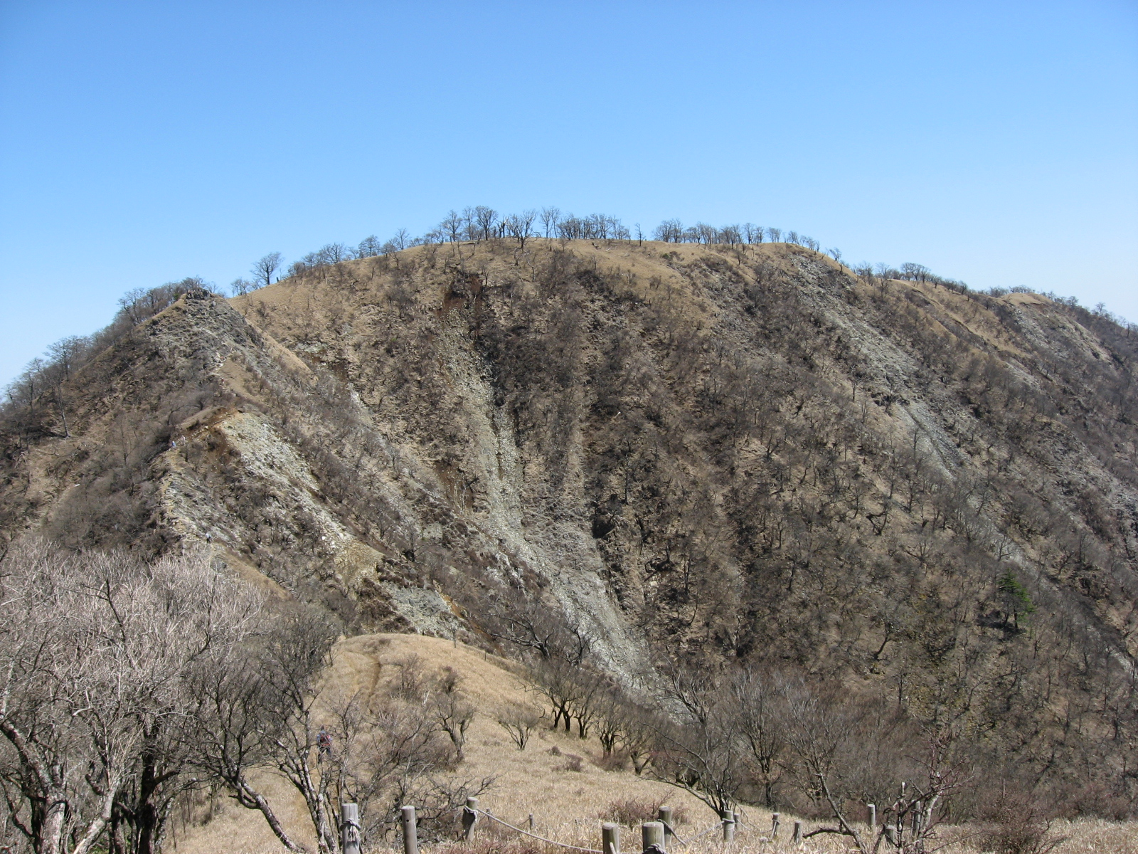 鬼ヶ岩ノ頭